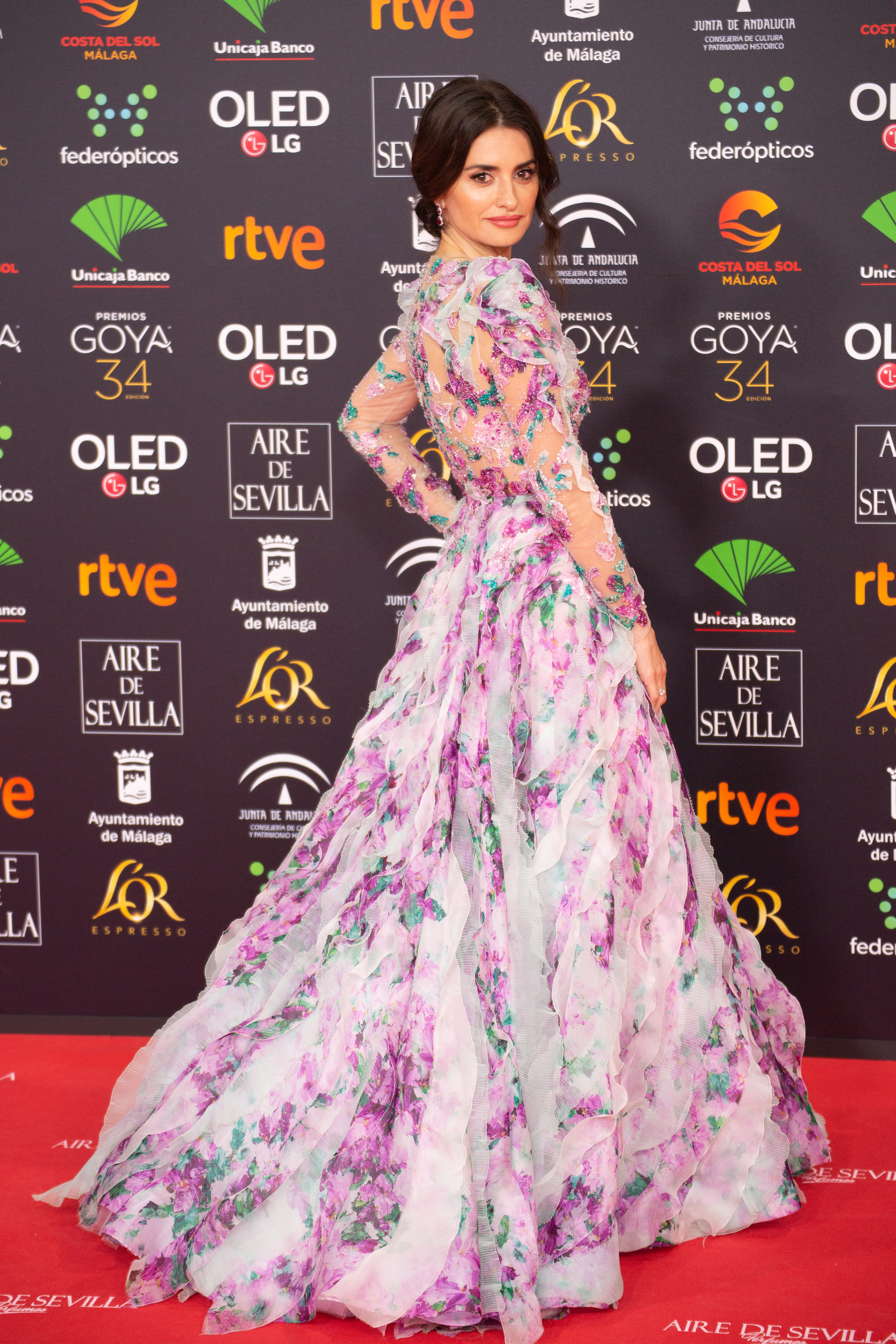 Penélope Cruz en la alfombra roja de la ceremonia de entrega de los Premios Goya 2020, celebrados en Málaga